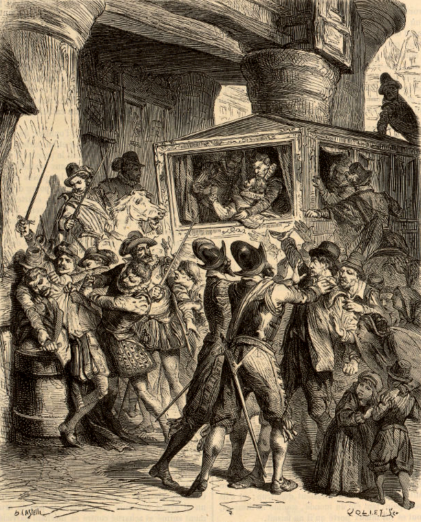 Assassinat d’Henri IV rue de la Ferronnerie (14 mai 1610) V. Duruy, Histoire populaire de la France, Paris, 1866, cat. n° 379f. BNF Département des estampes et de la photographie